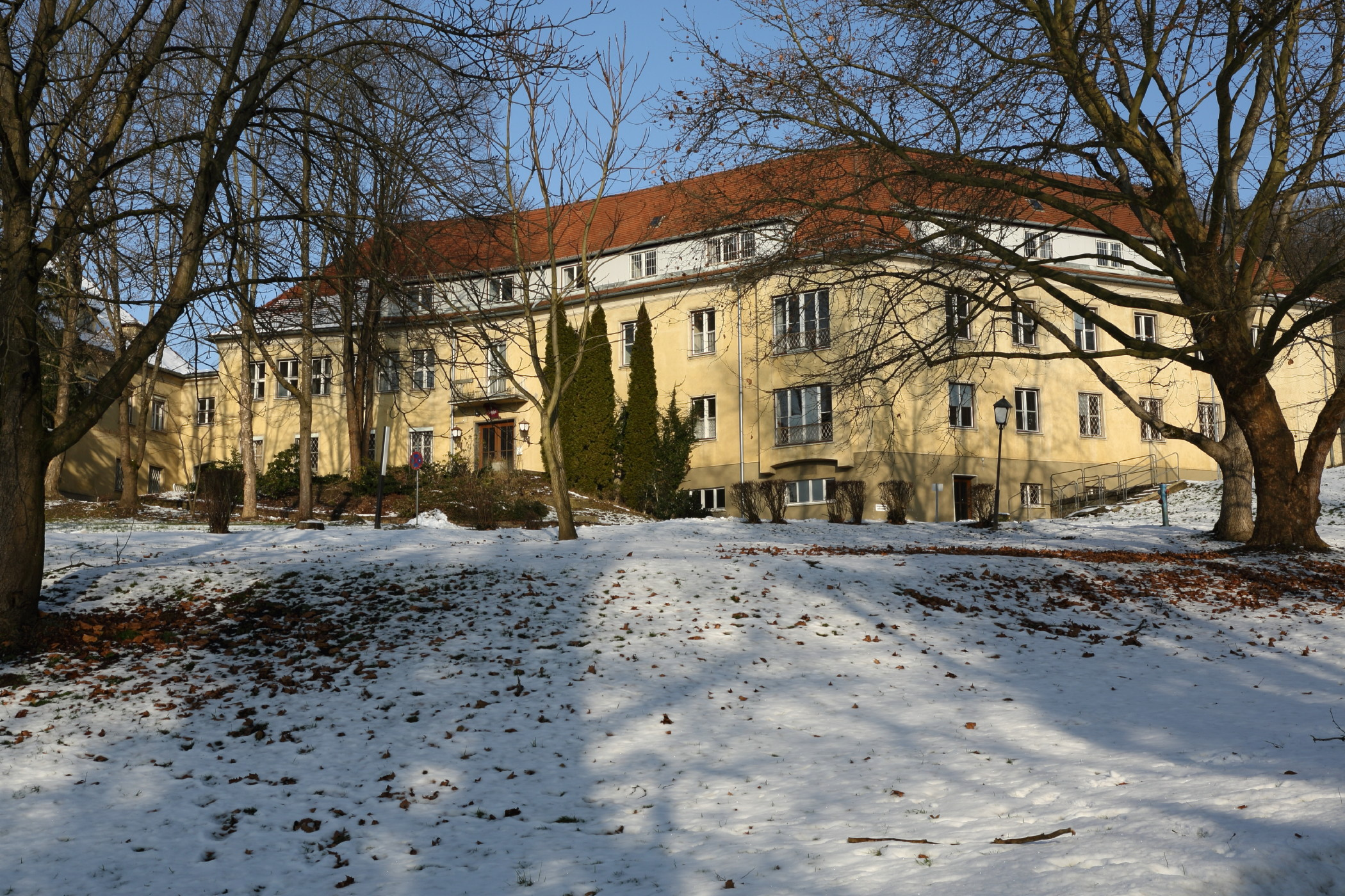 ehemalig Landesjugendheim für Knaben Rosenhof